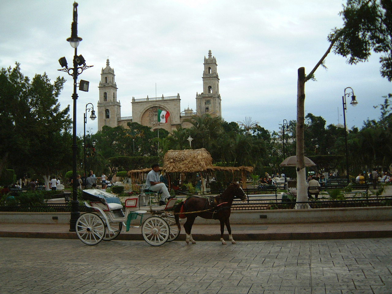 Main Plaza, Mérida Yucatán México